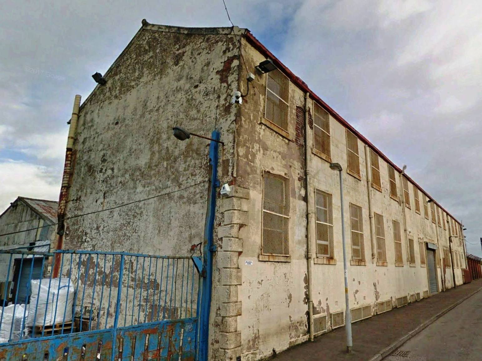 Die Paterson Street Mill, auch Rockliffe Mill, zwischen Paterson Street und Leeds and Liverpool Canal, inzwischen abgebrochen. Erbaut 1851-52 durch James und A. W. Paterson als Weberei mit anfangs 337 Webstühlen angetrieben von einer 25-PS-Maschine. A. W. Patersons Stiefvater, David Nichol, führte das Werk in den 1860er Jahren und ging 1868 bankrott. R. W. Hutchinson erwarb die Liegenschaft 1870 und betrieb darin die Rockcliffe Cloth Co. mit Weberei und zusätzlich einer Spinnerei mit 15'998 Spindeln. Die Weberei wurde 1887 an George Holden verpachtet, Hutchinson ging 1890 mit der Spinnerei pleite und statt ihrer zog eine chemische Fabrik ein. Die Weberei wurde in den 1890er Jahren ausgebaut auf 648 Webstühle. Eine neue horizontale Maschine sorgte für den Antrieb. Hergestellt wurden in der Weberei hauptsächlich Batist und Hemdenstoff. George Holden Ltd. produzierte bis zur Schließung 1955. Der Bau hatte Keller, Parterre und ersten Stock, das backsteinerne Lagerhaus mit Garnfertigung mit 16 Achsen zur Paterson Street, die Weberei schloss am Ostgiebel an. Die EMSA Works & Herbert Foot Appliance nutzten 1938 bis 1960 die untere Etage im Lagerhaus zur Paterson Street.